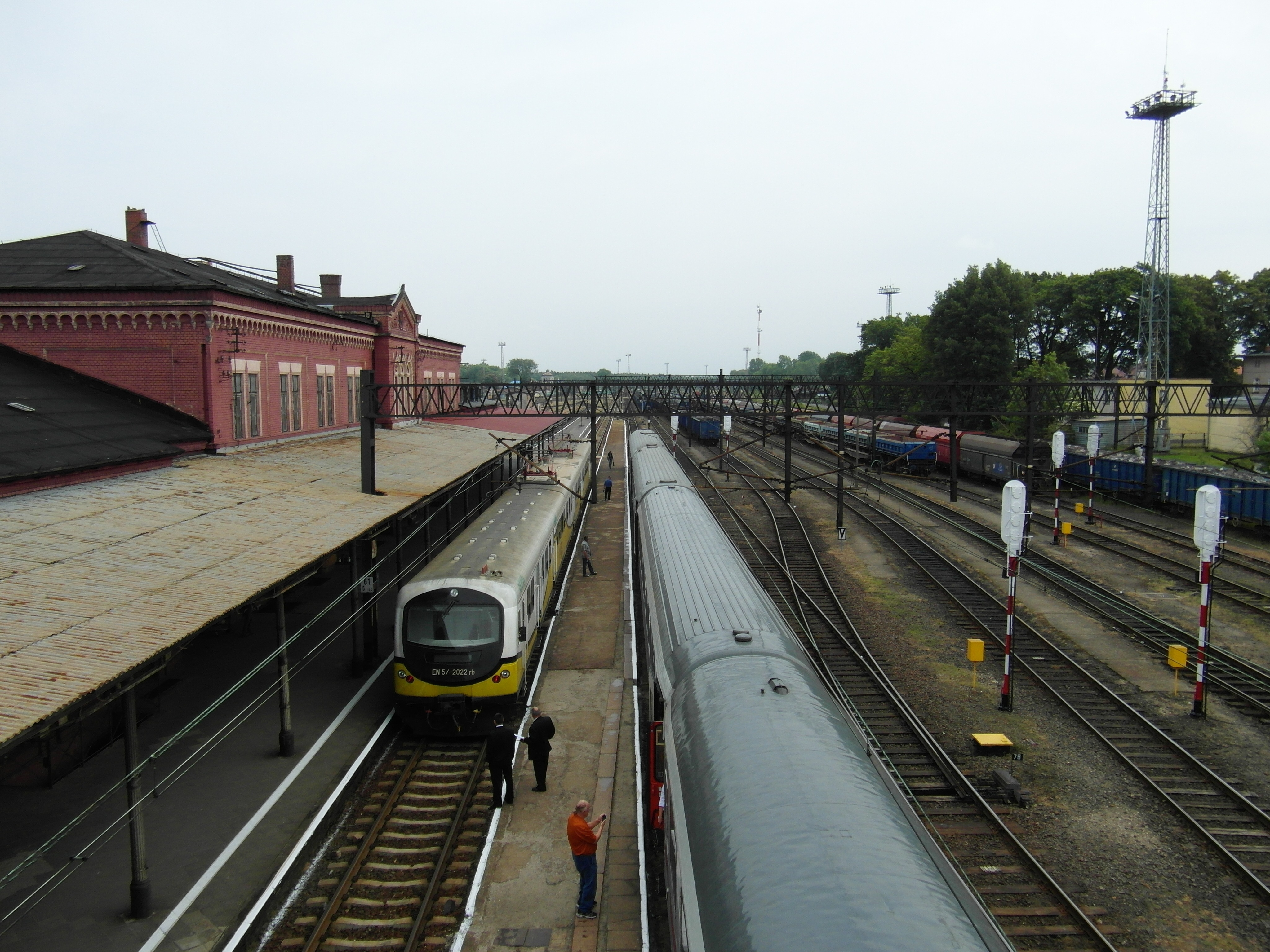 Kohlfurt - Bahnhof